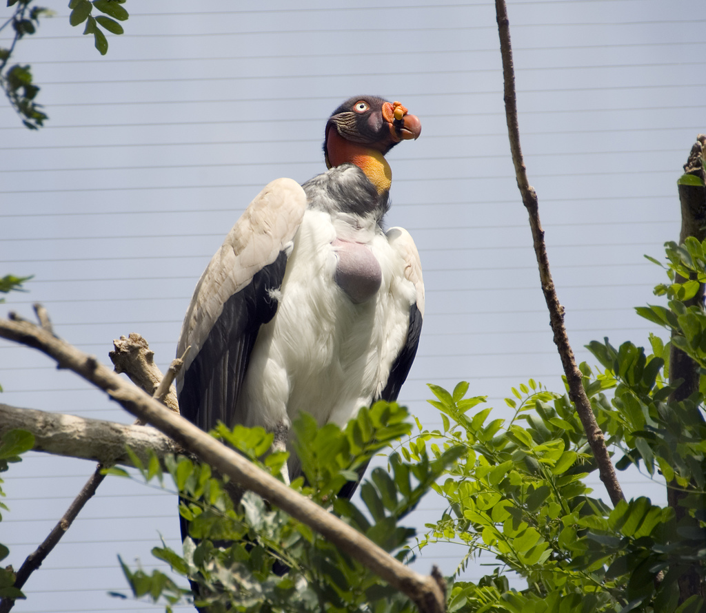 London Zoological Gardens, 2006